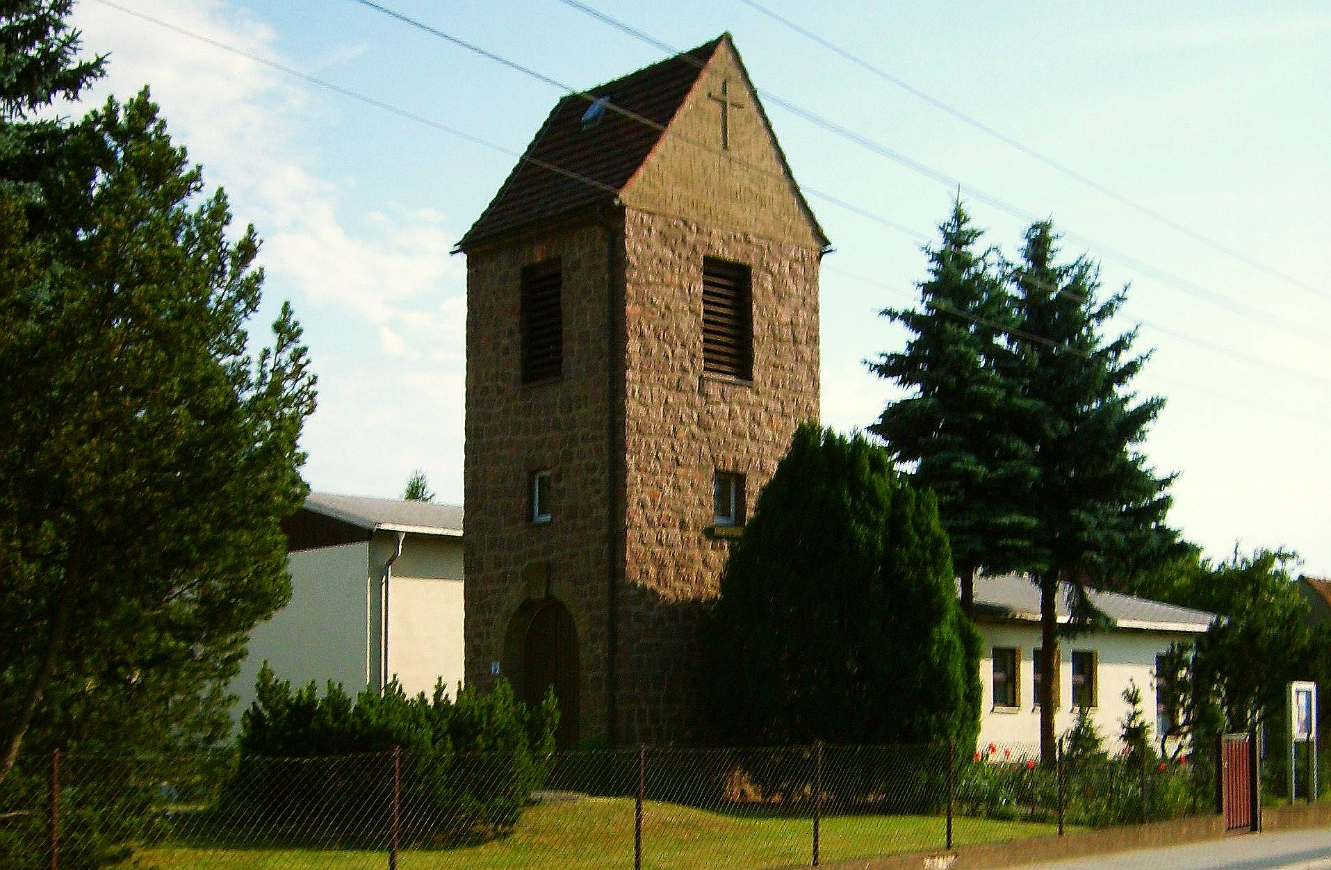 Merzdorf